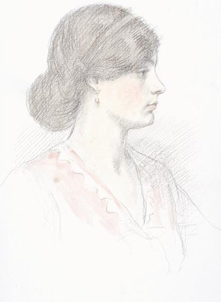 Lydia May Bidmead (1888-1984) später Ehefrau des Malers Brian Hutton (1887-1916)